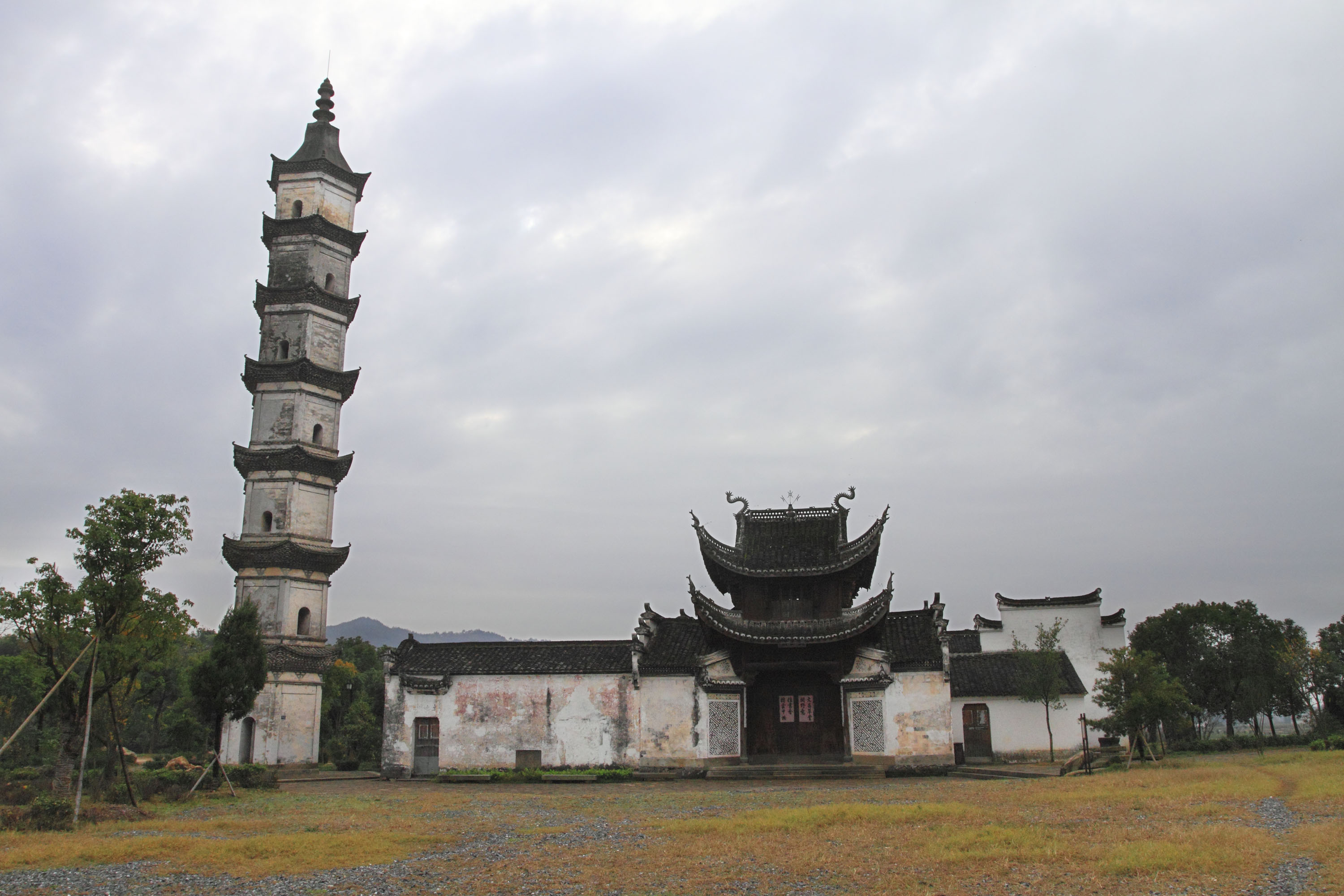 浙江省建德市新叶村抟云塔与文昌阁